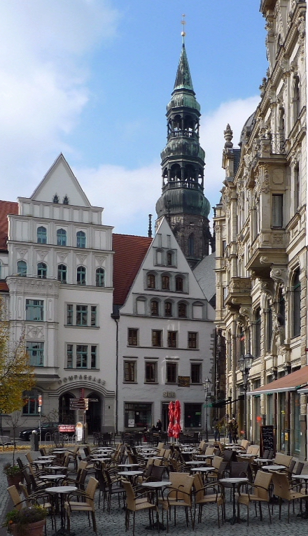 Zwickau Hauptmarkt - im Hintergrund die Marienkirche